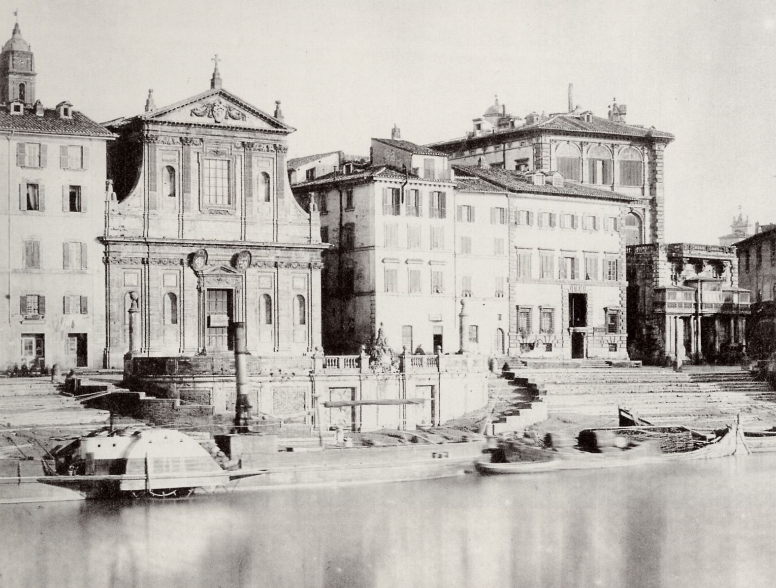 Italienischer Photograph um 1865: Der Porto di Ripetta